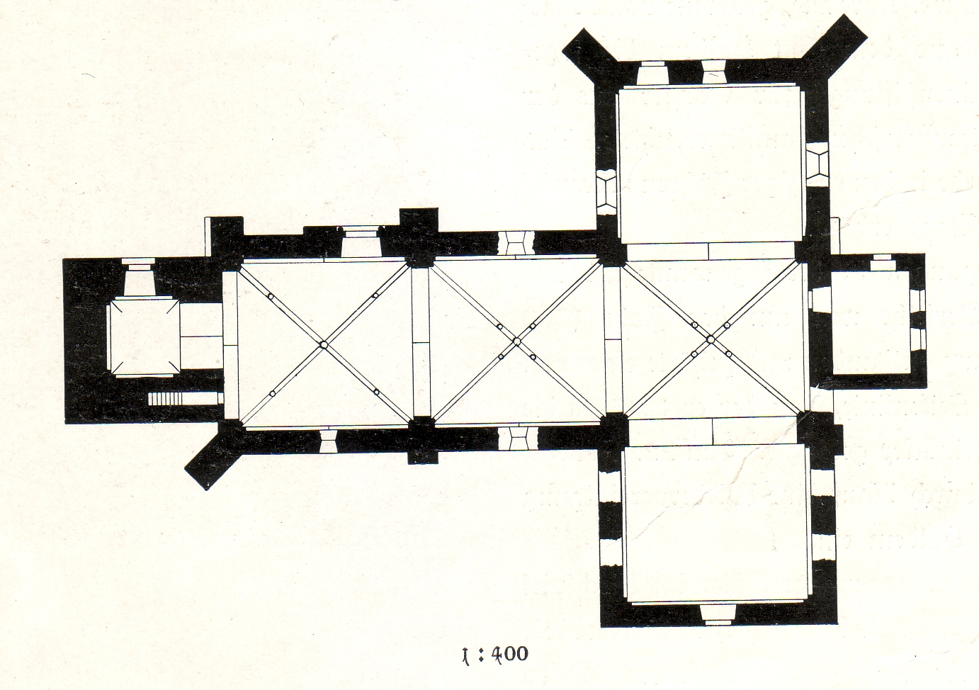 St. Marien (Stemwede-Dielingen)